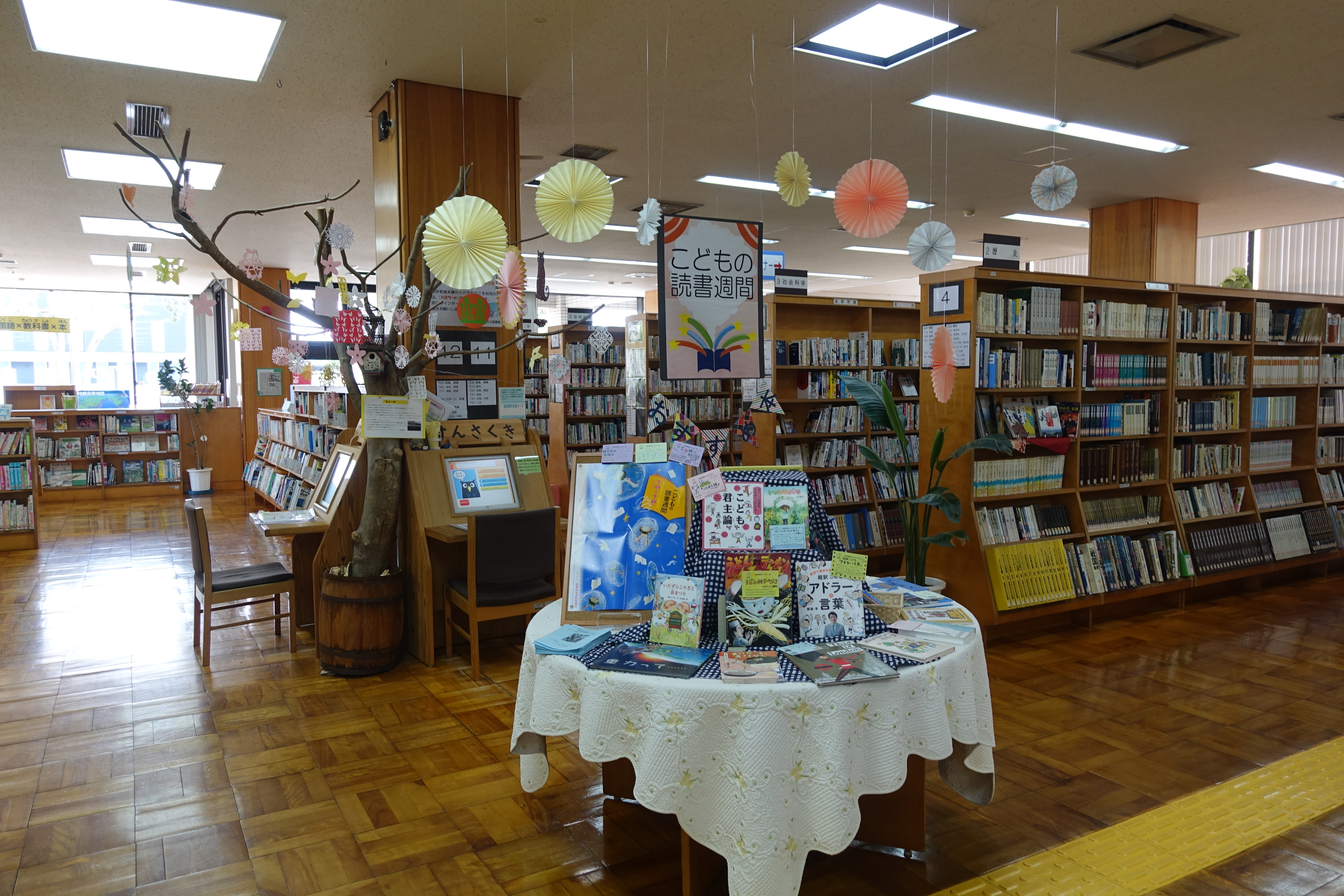 鹿児島県指宿市にある指宿図書館の館内